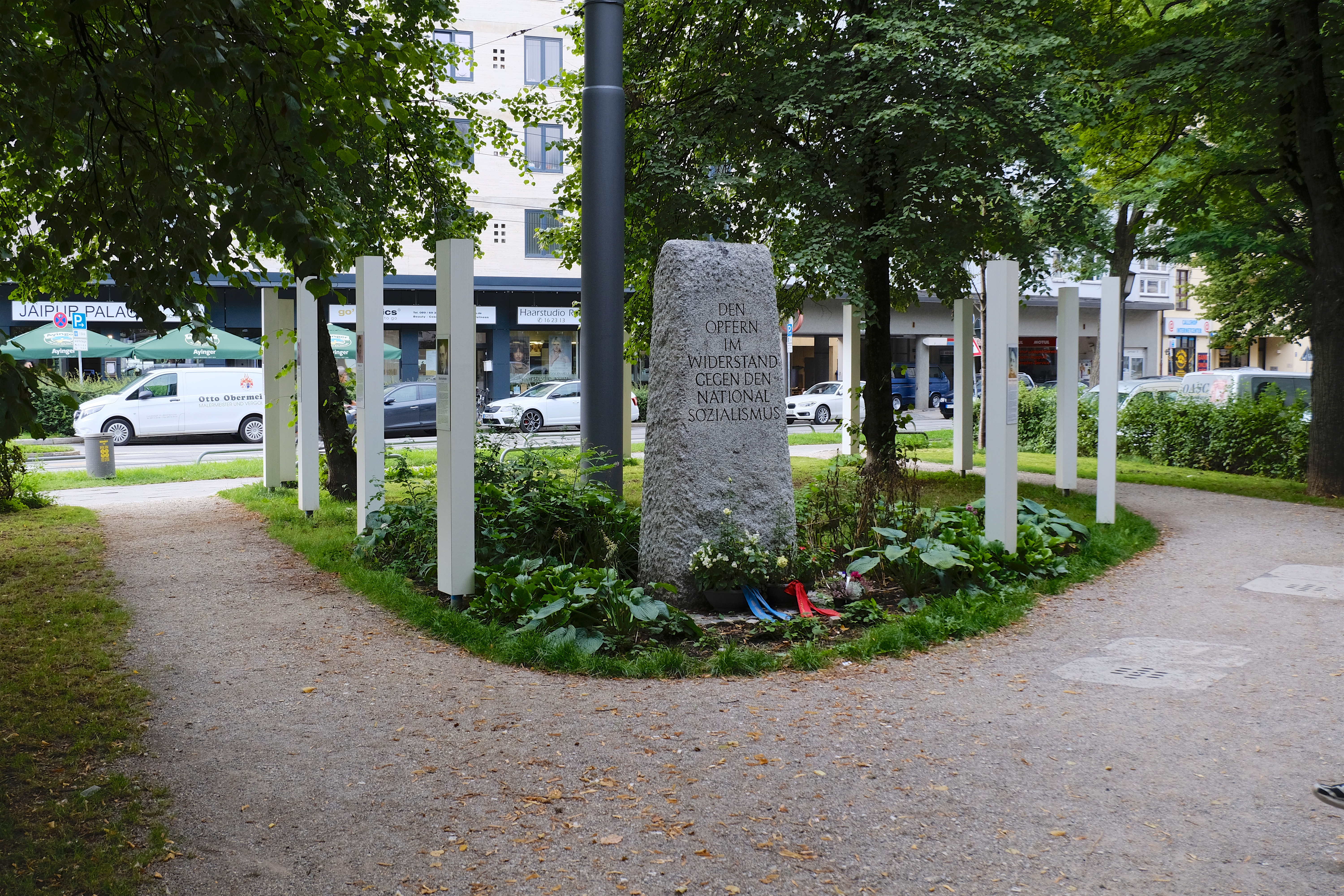 Denkmal am Platz der Freiheit in München